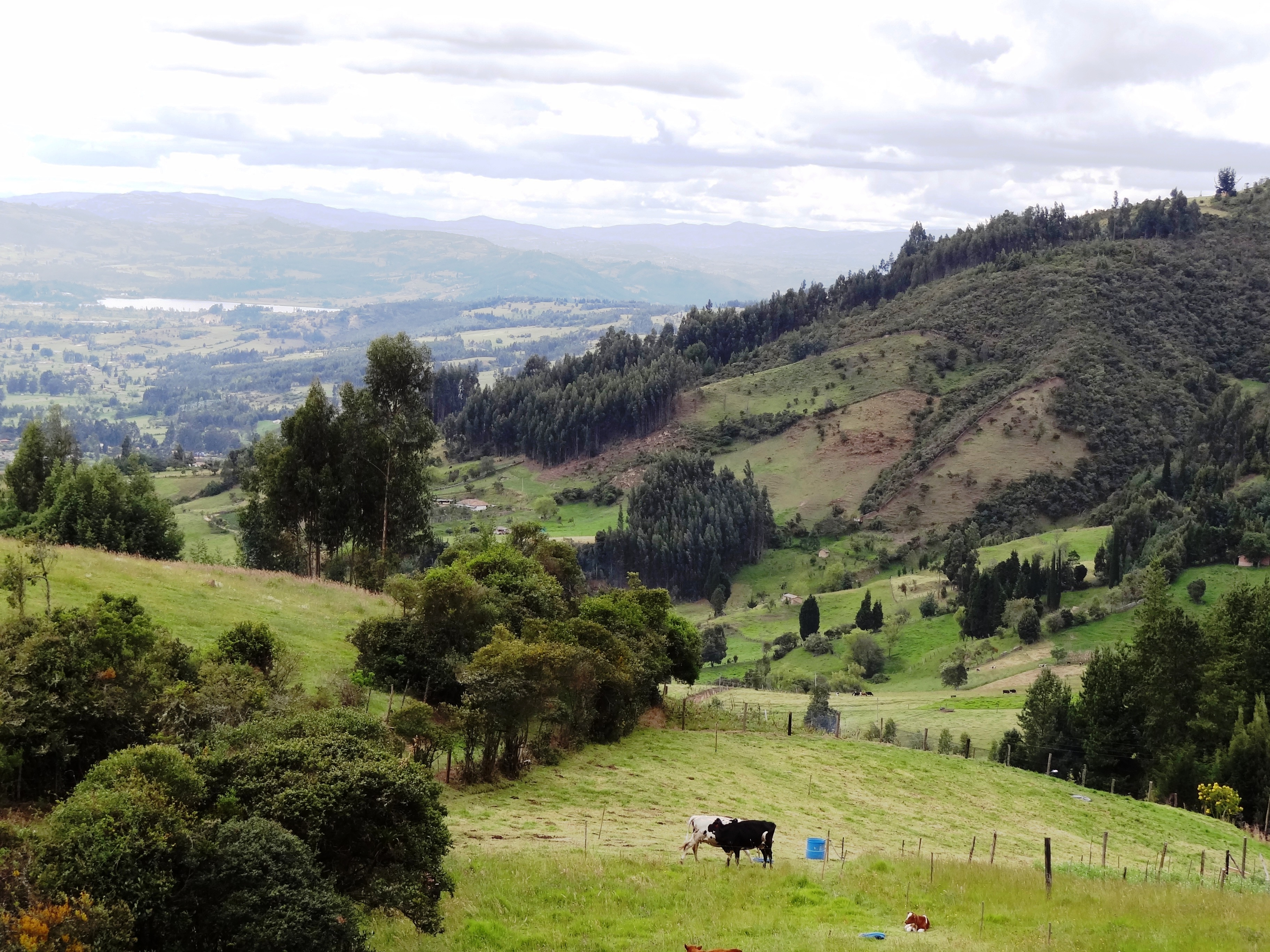 Paraje rural en la vereda Sirata en el municipio de Duitama, departamento de Boyacá, Colombia.